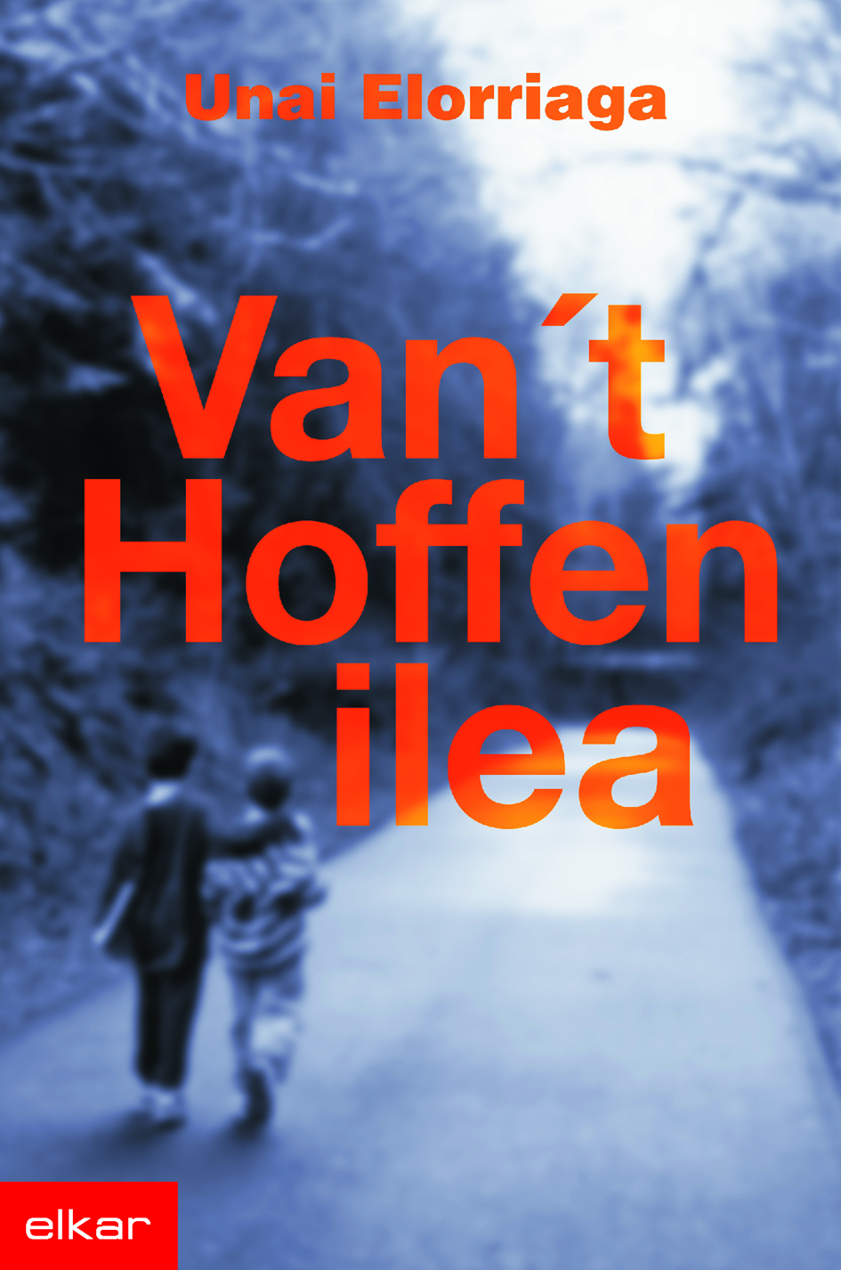 "Van't Hoffen ilea" liburuaren azala. Idazlea: Unai Elorriaga. Azalaren diseinua: Borja Goitia.